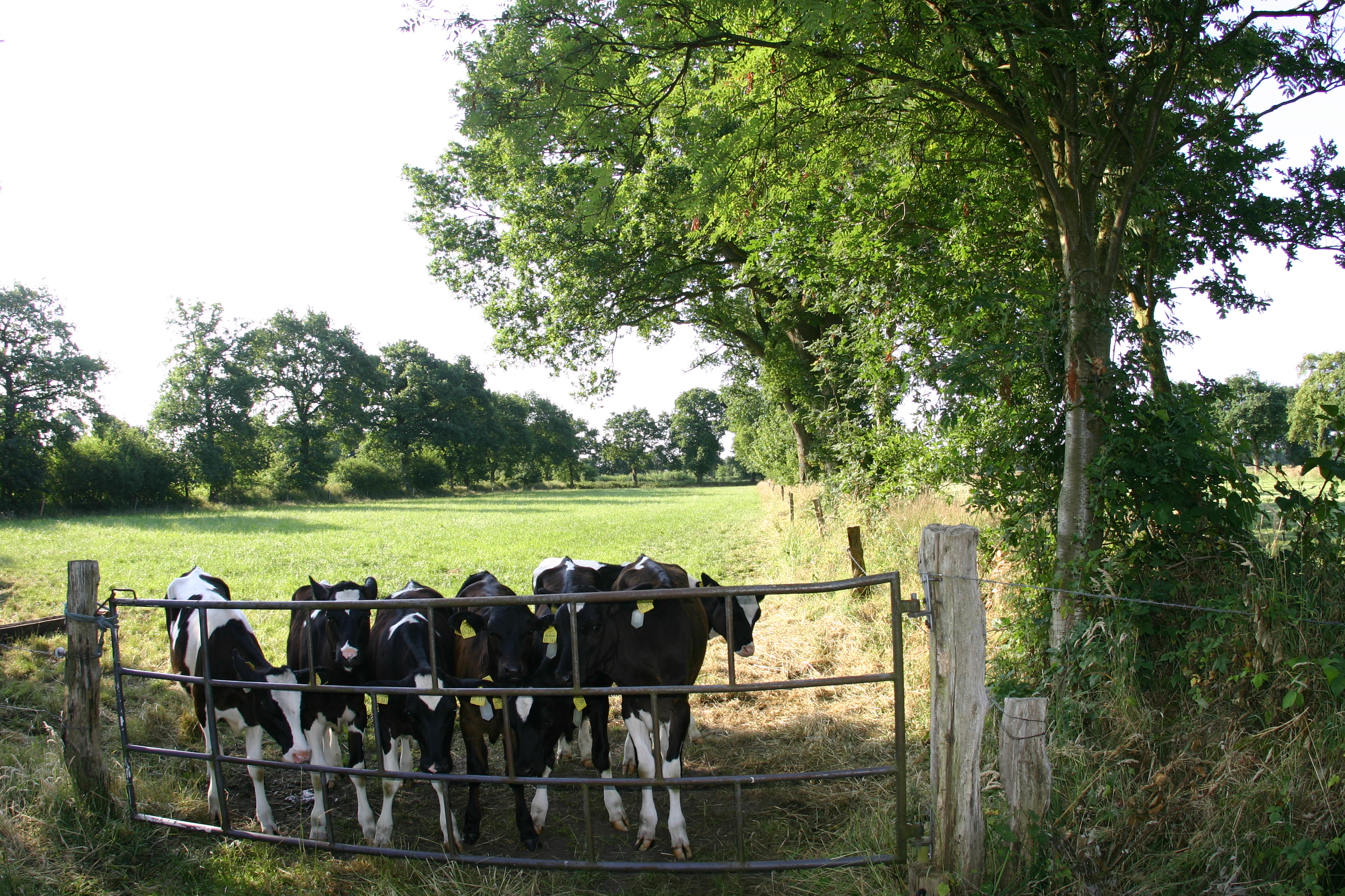 Wallheckenlandschaft mit kleinen Parzellen in Wrisse (Gem. Großefehn, LK Aurich, Ostfriesland, Niedersachsen). Während kleine Parzellen zumeist zur Viehhaltung genutzt werden, wird auf größeren auch Getreide u. ä. angebaut.